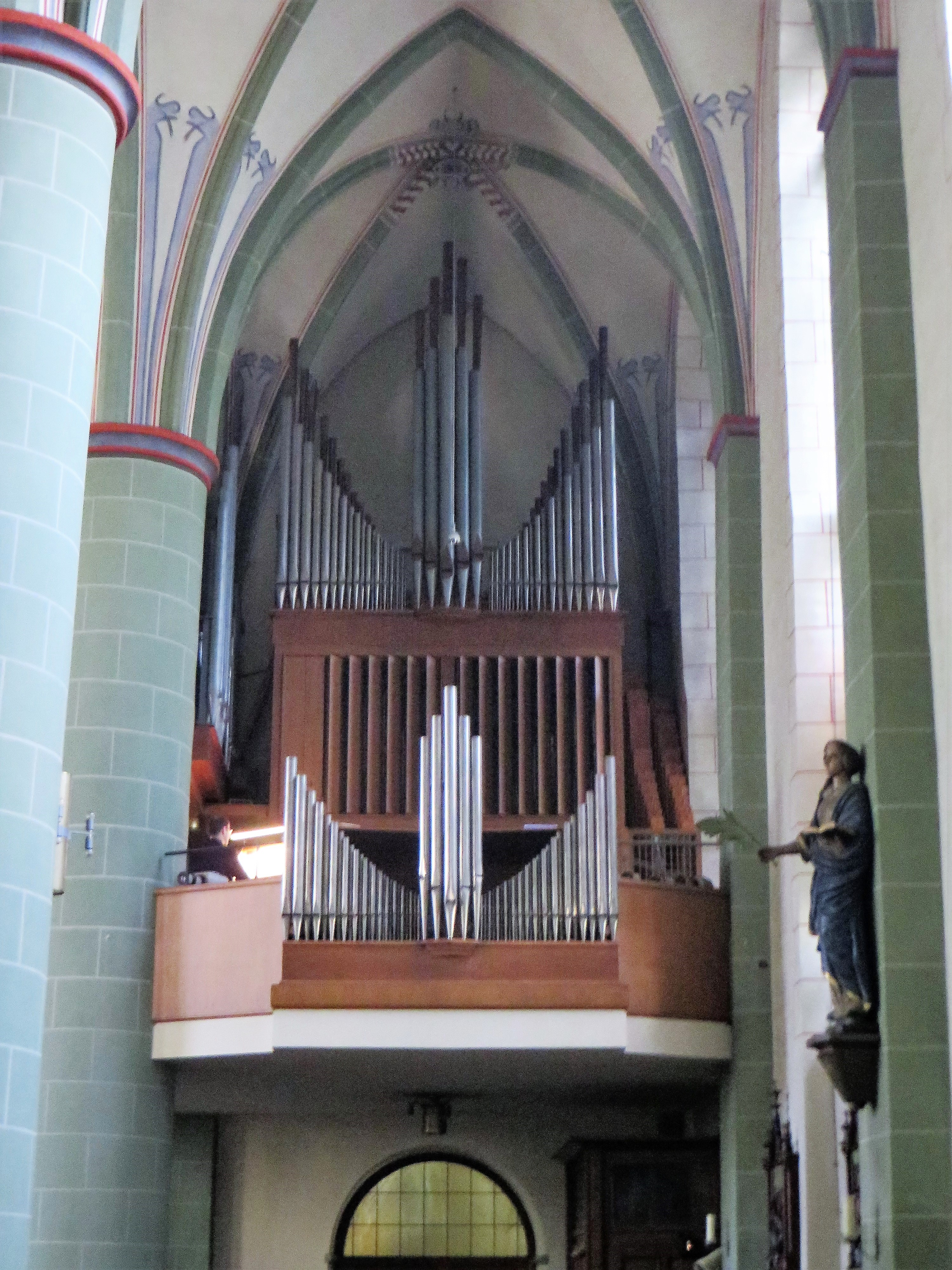 Katholische Pfarrkirche St. Johannes Baptist in Attendorn. Blick auf die Orgelempore, Vorderansicht. Klais-Orgel aus dem Jahr 1957 mit drei Manualen und 43 klingenden Registern.